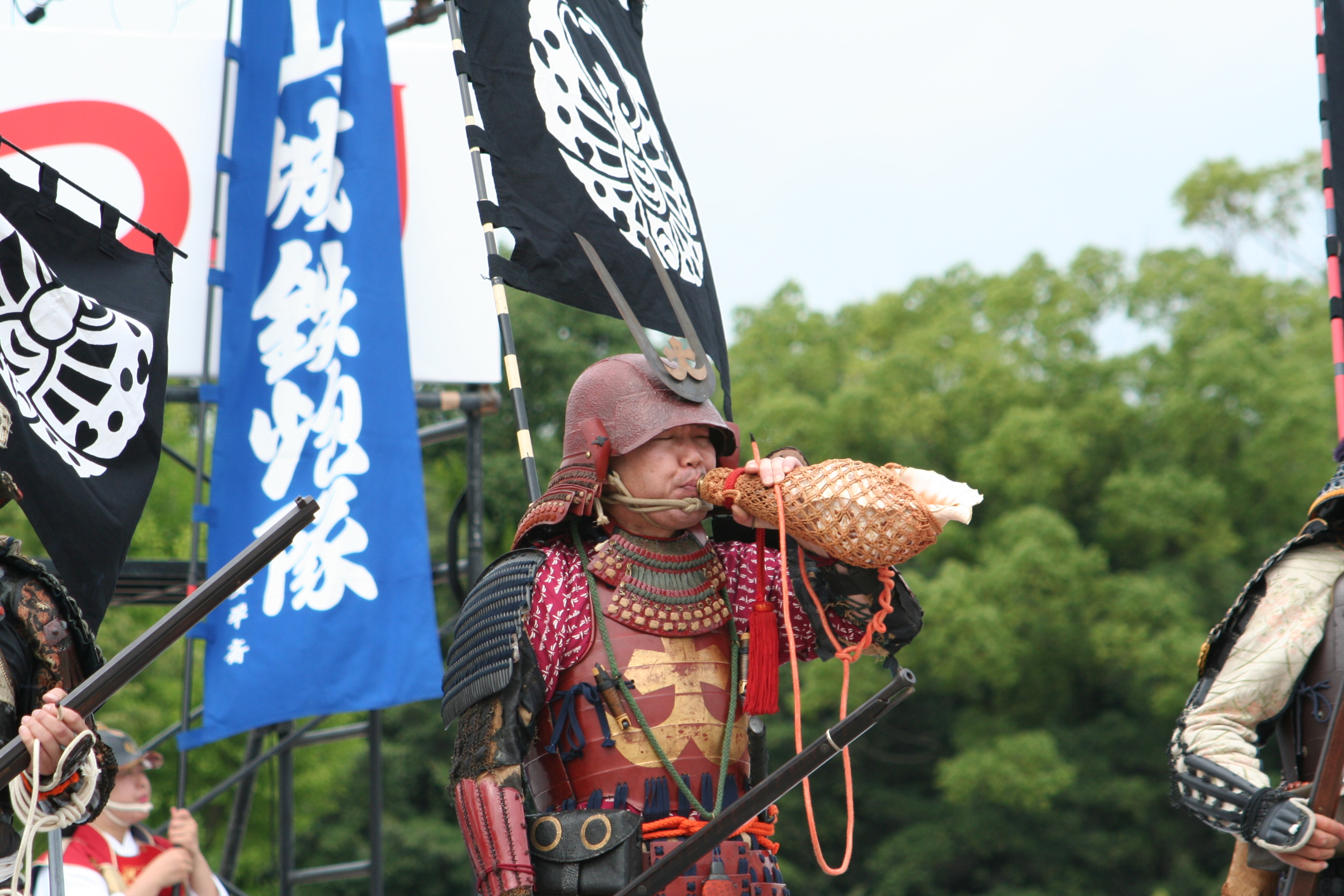 姫路お城祭。兵庫県姫路市にて毎年7月末から8月2日の3日間に渡り姫路城の南部大手前通りにて開催される祭である。第60回開催の2日目の祭の様子。 法螺貝を吹く甲冑武者。